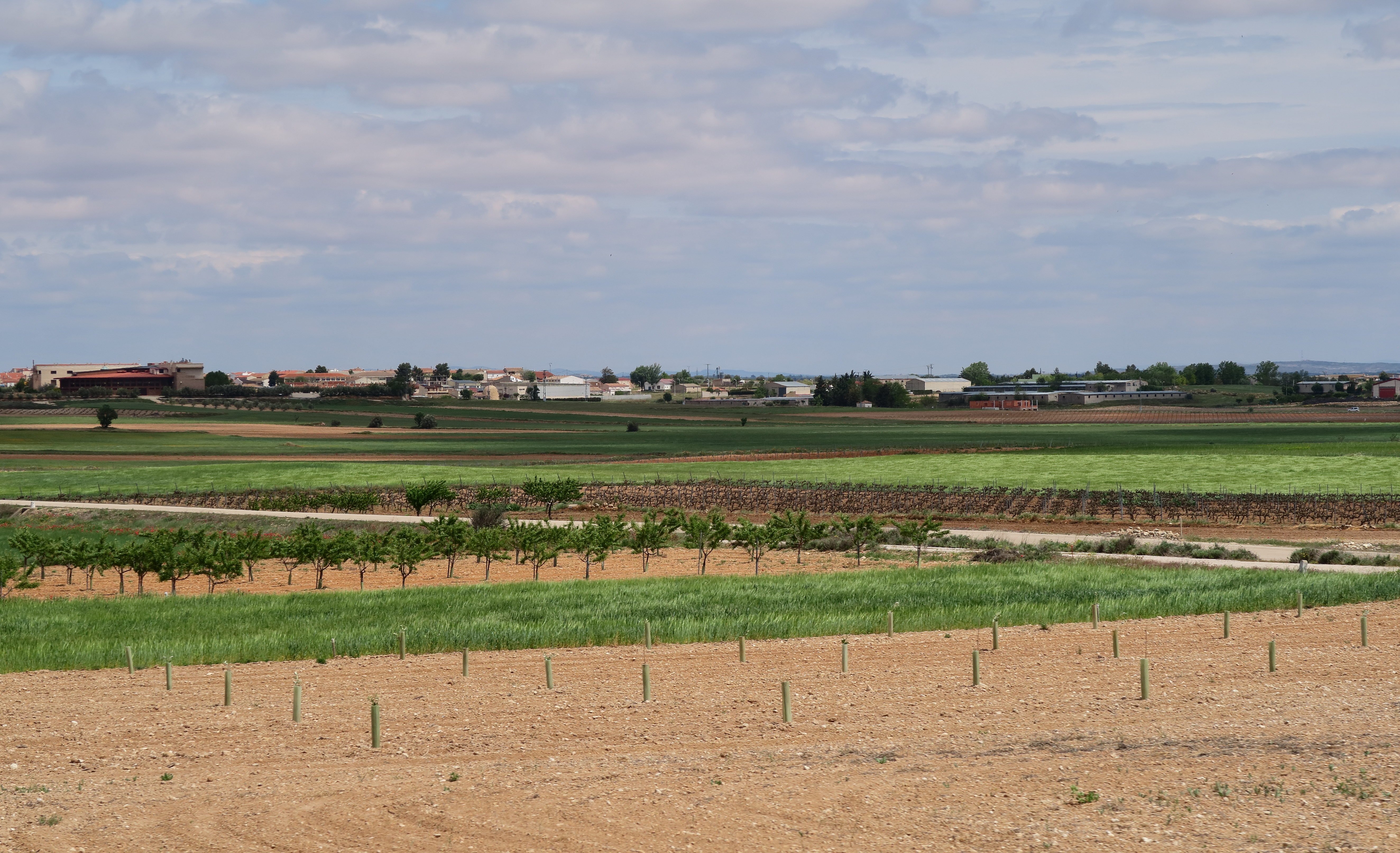 Valdeganga, vista de la población desde la CM-3218